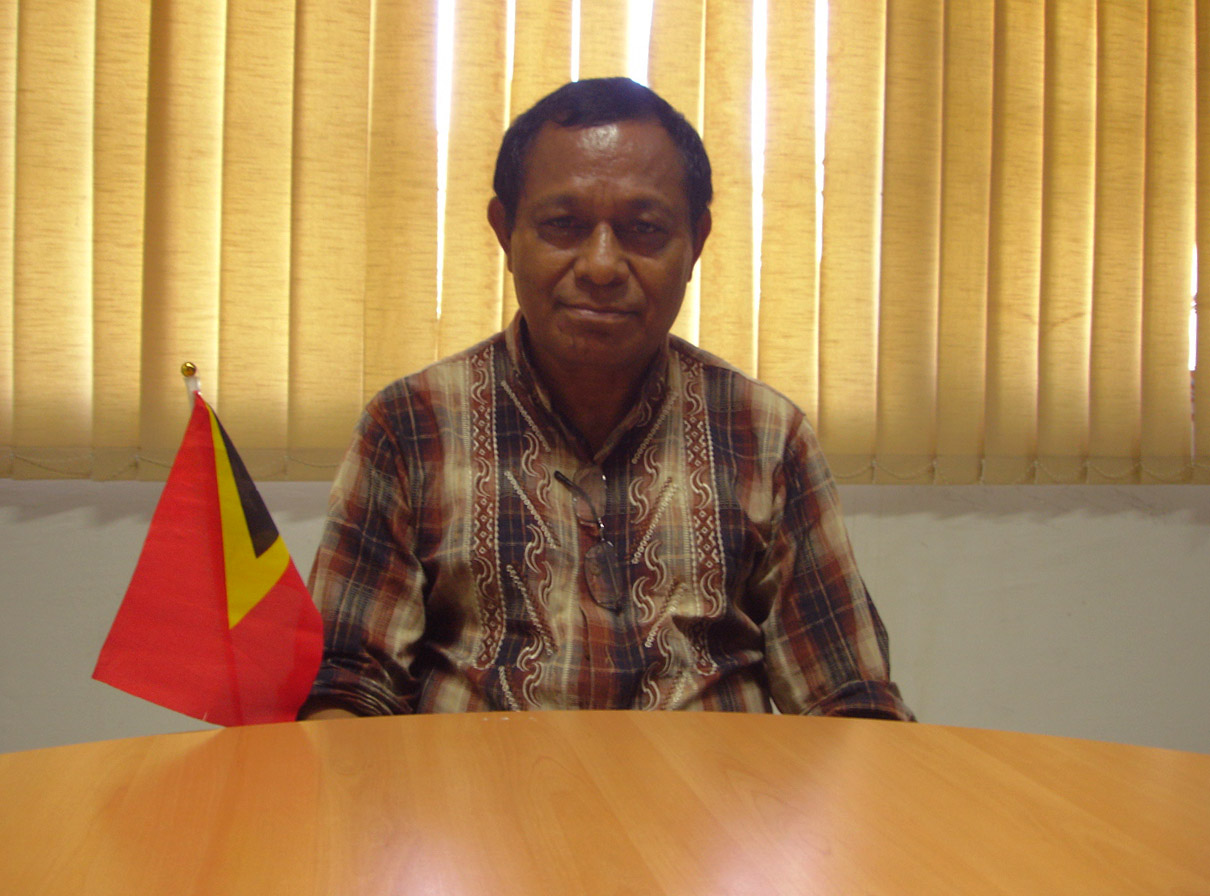 Victor dos Santos, Administrator der Gemeinde Ermera